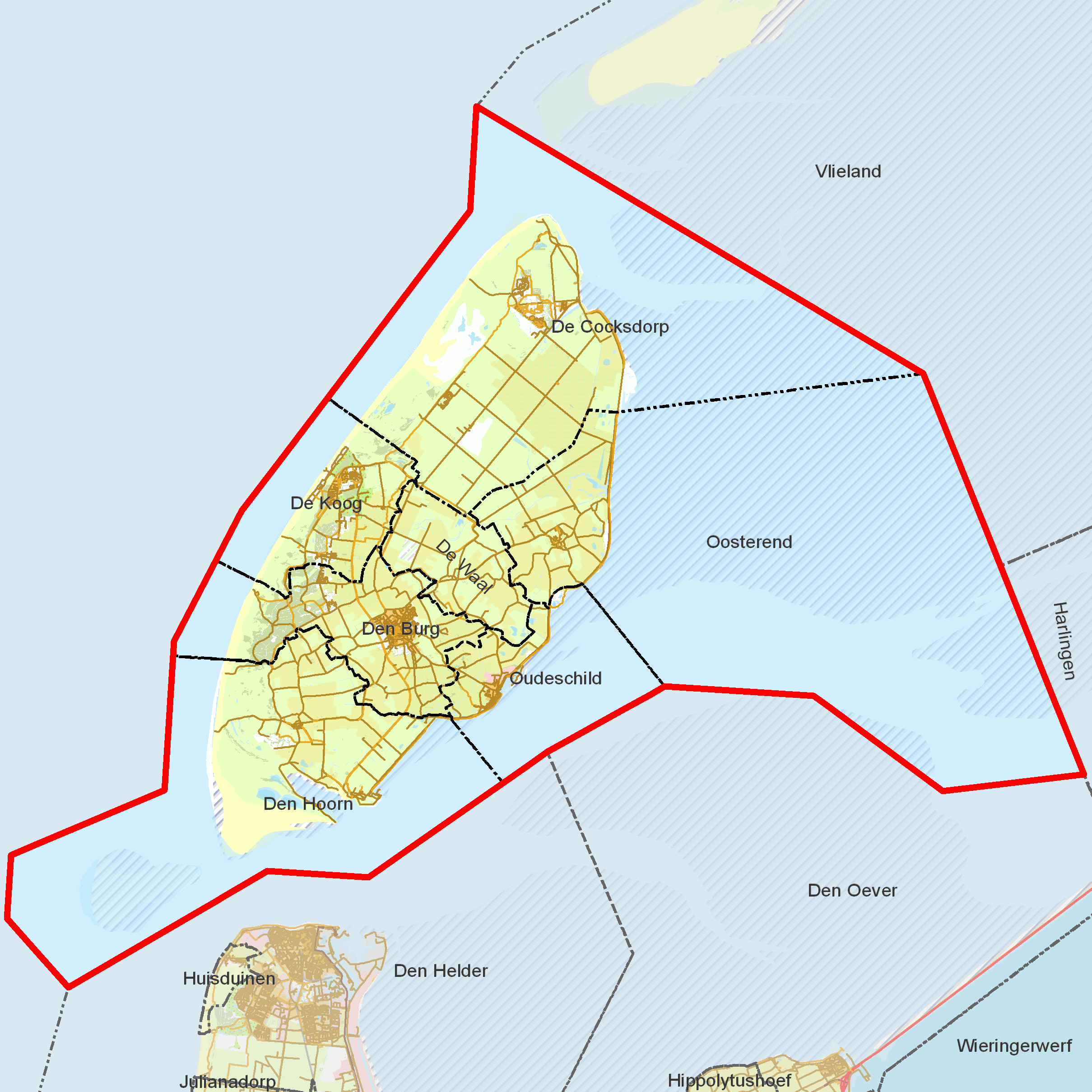 BAG woonplaatsen - Gemeente Texel.png